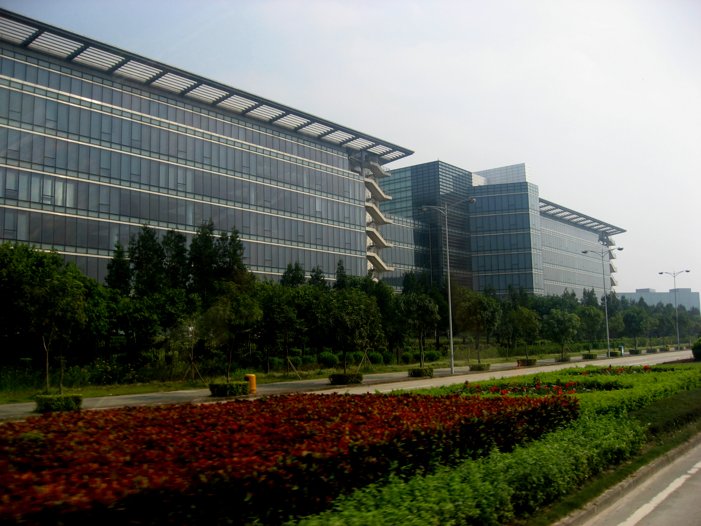 Huawei Technology in Shenzhen, China